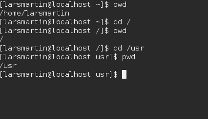 PWD kommando terminal